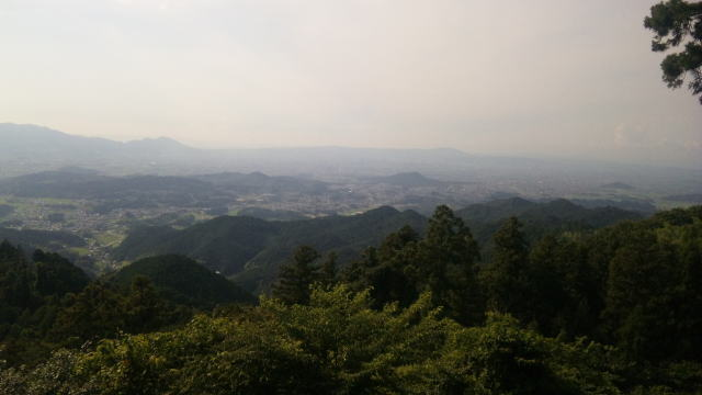 高取城国見櫓跡から奈良盆地を望む。